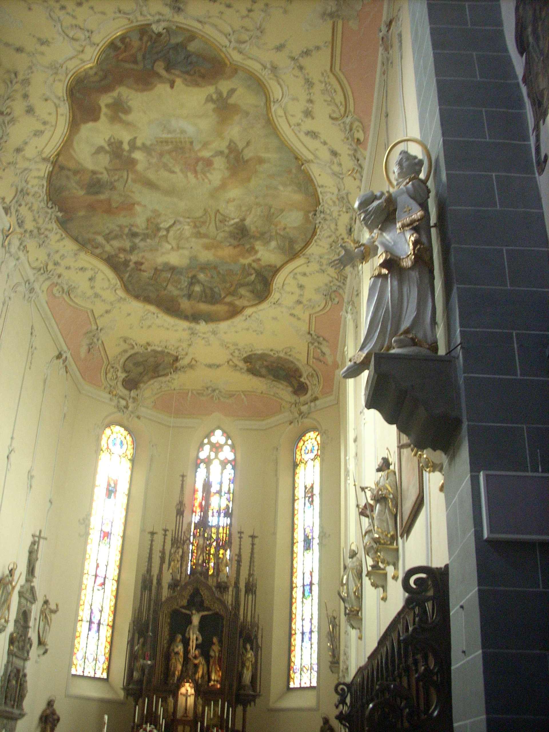 Konstanz, St. Stephan, Blick in den Chor, rechts Stephanus-Statue (1770)